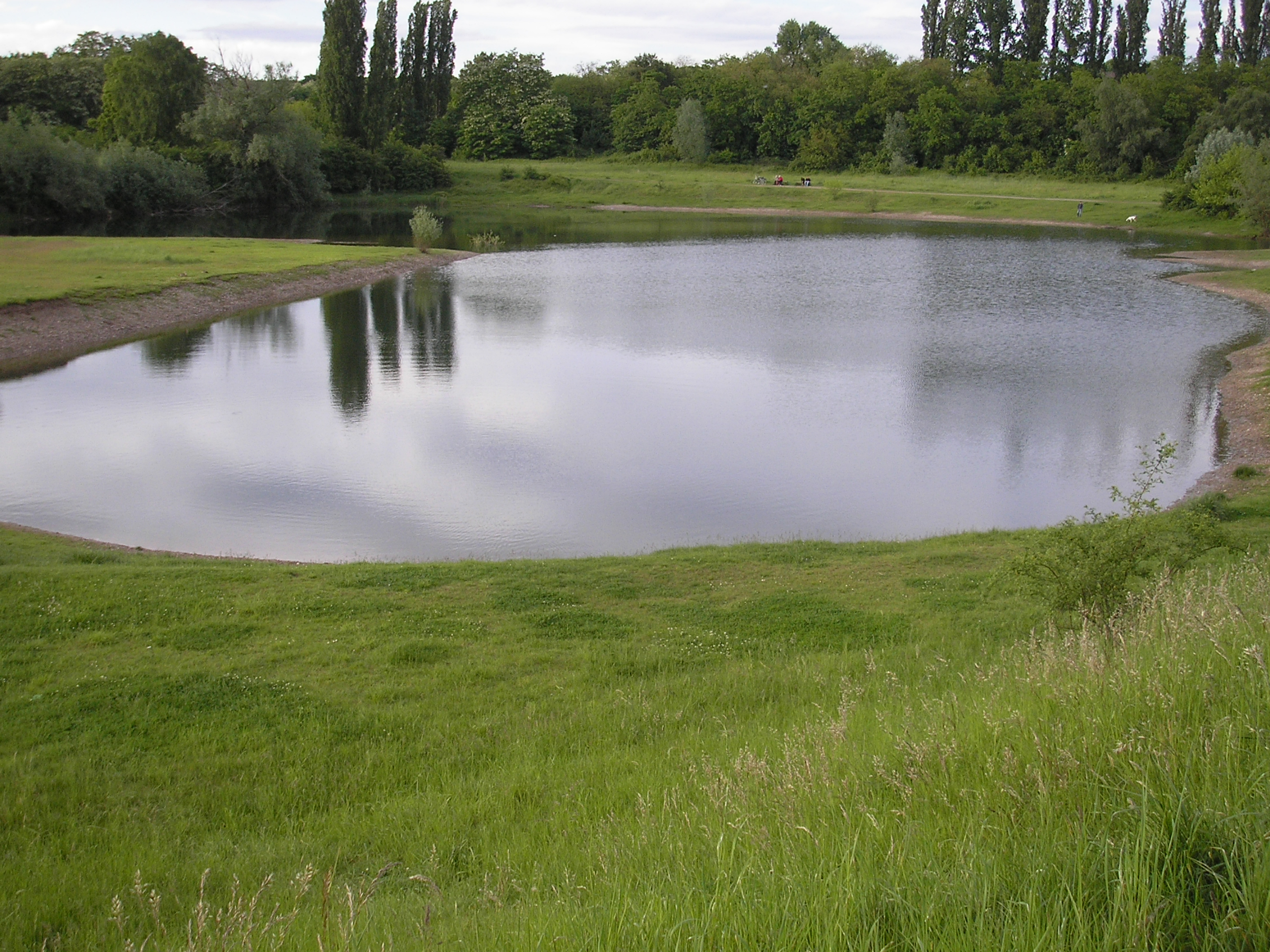 See in der Westhovener Aue. Teil des früheren Pionierübungsgeländes.